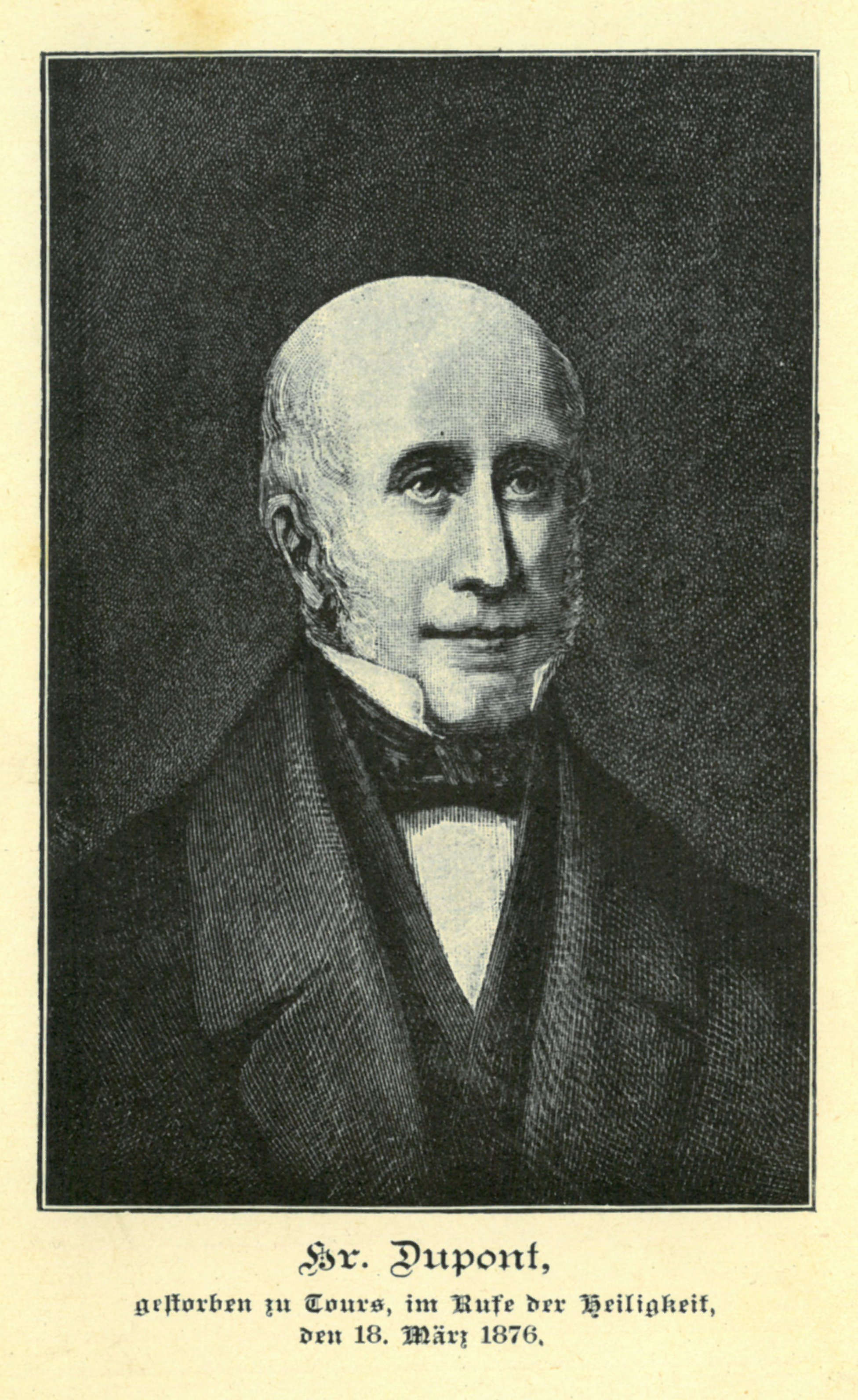 Portrait-Stich von Leo Dupont